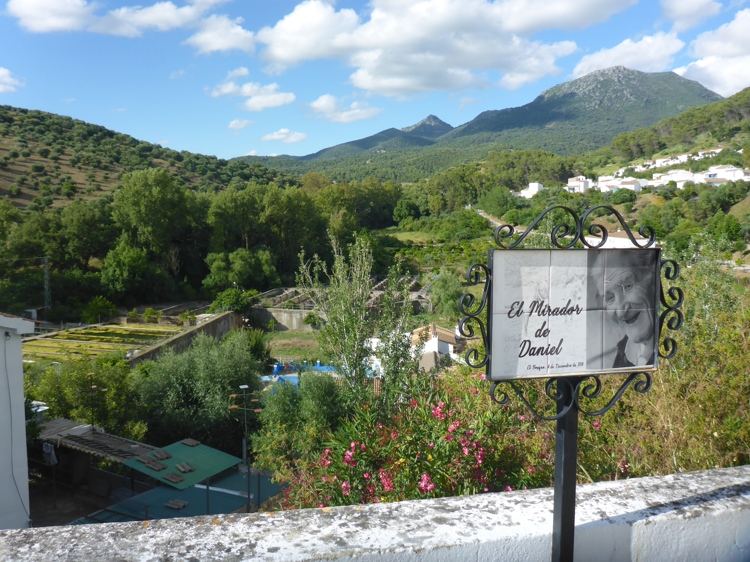 El Bosque (Andalucía, España)